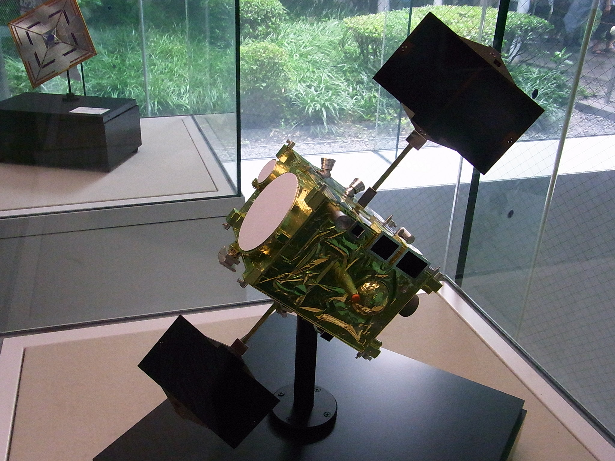 探査機「あかつき」